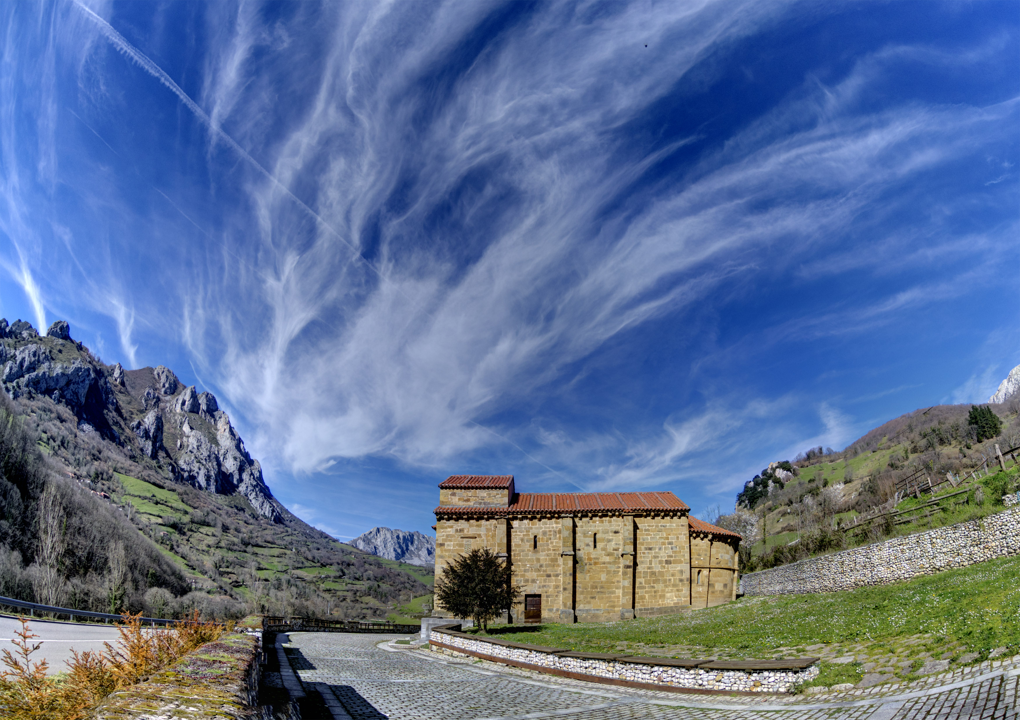 Iglesia ubicada en Arrojo, concejo de Quirós, Asturias. Se desconoce su fecha de construcción (se supone de los siglos XII o XIII). Aunque recientemente restaurada, su ábside está hundido.